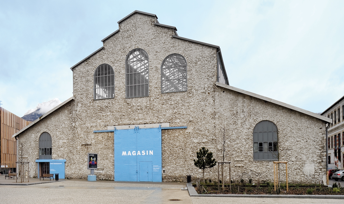 MAGASIN CNAC